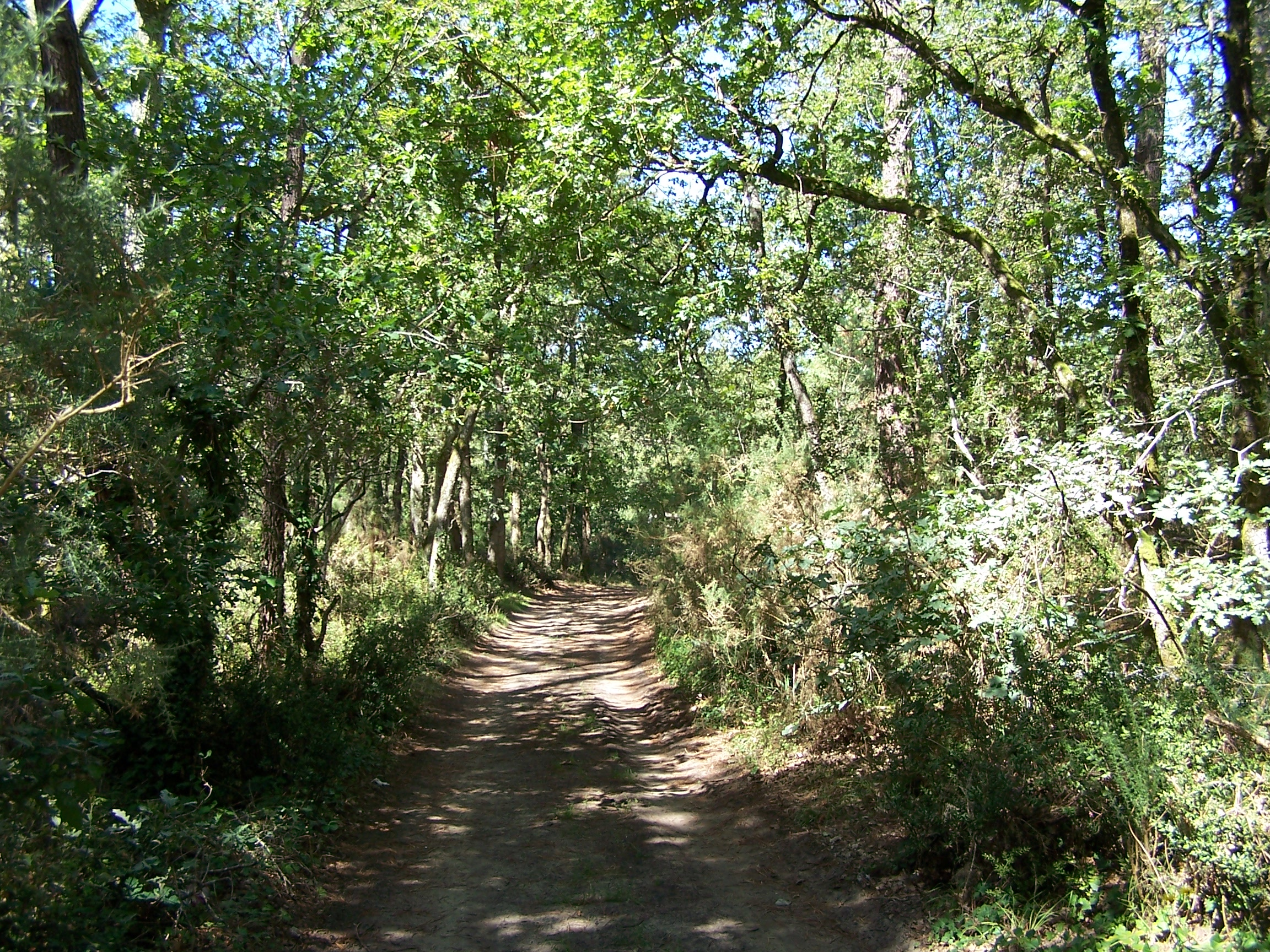 Photographie prise dans la forêt de la Coubre, une forêt domaniale couvrant plus de 4 277 hectares en bordure du littoral de la presqu'île d'Arvert, en Charente-Maritime, sur les communes des Mathes et de La Tremblade. C'est une forêt de pins maritimes, de chênes verts, de chênes pédonculé et d'arbousiers qui a été plantée au début du XIXe siècle pour contenir l'avancée des sables et protéger le site des érosions éolienne et marine très actives. Classée forêt littorale de protection, elle abrite une faune variée comportant notamment des cerfs élaphes, des chevreuils et des sangliers.